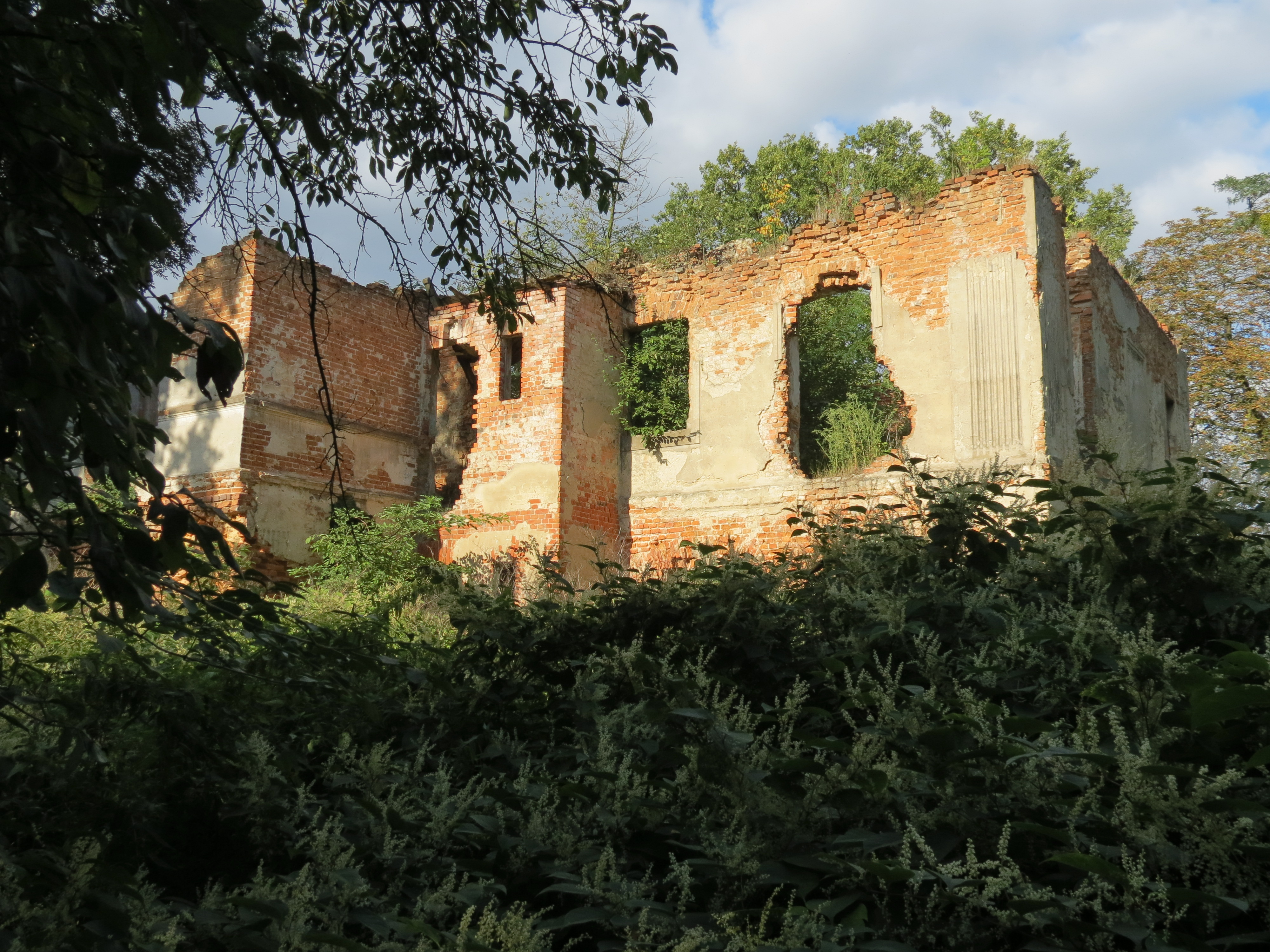 Ruiny dworu w Jasionie